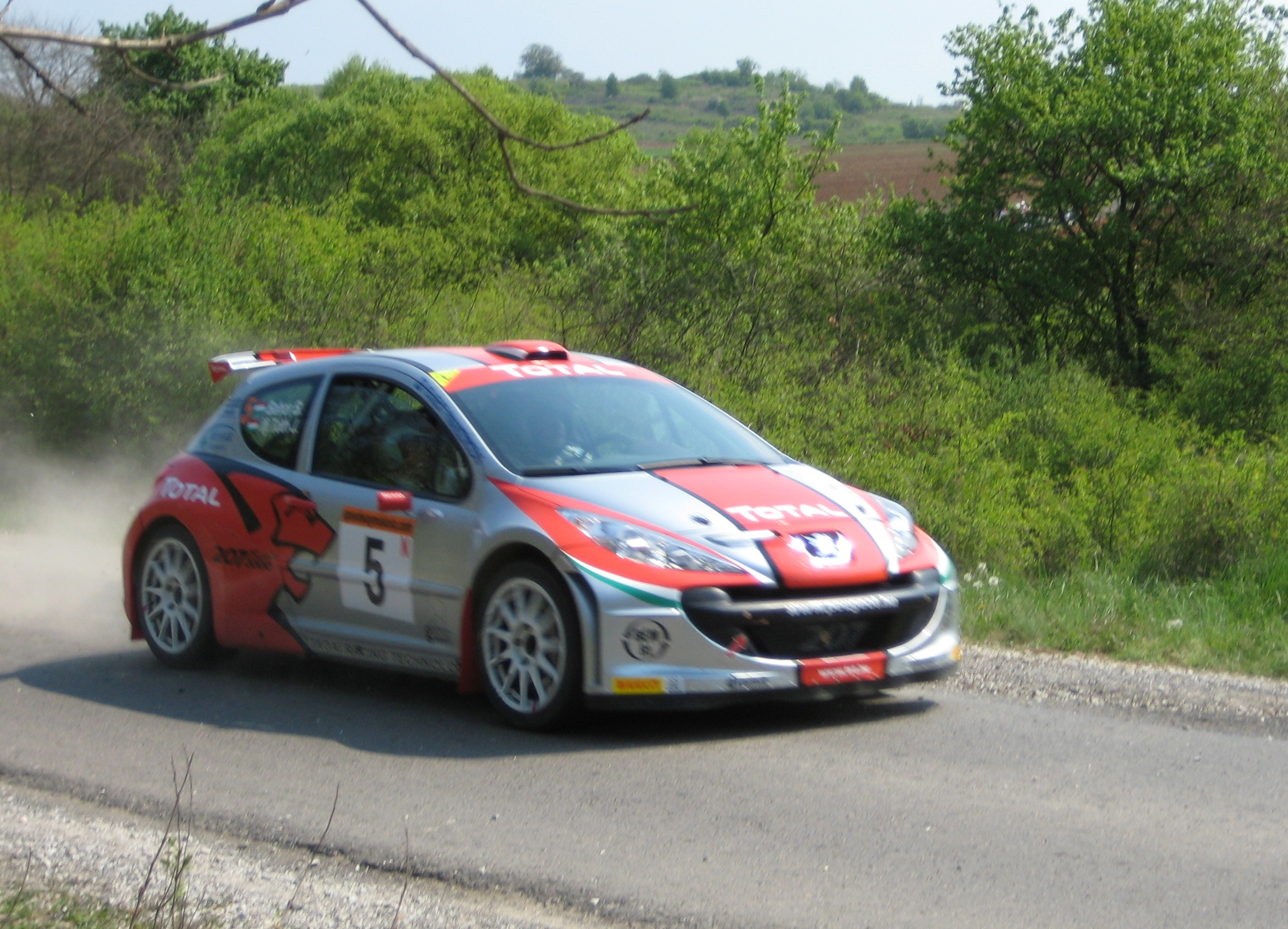 Miskolc Rally